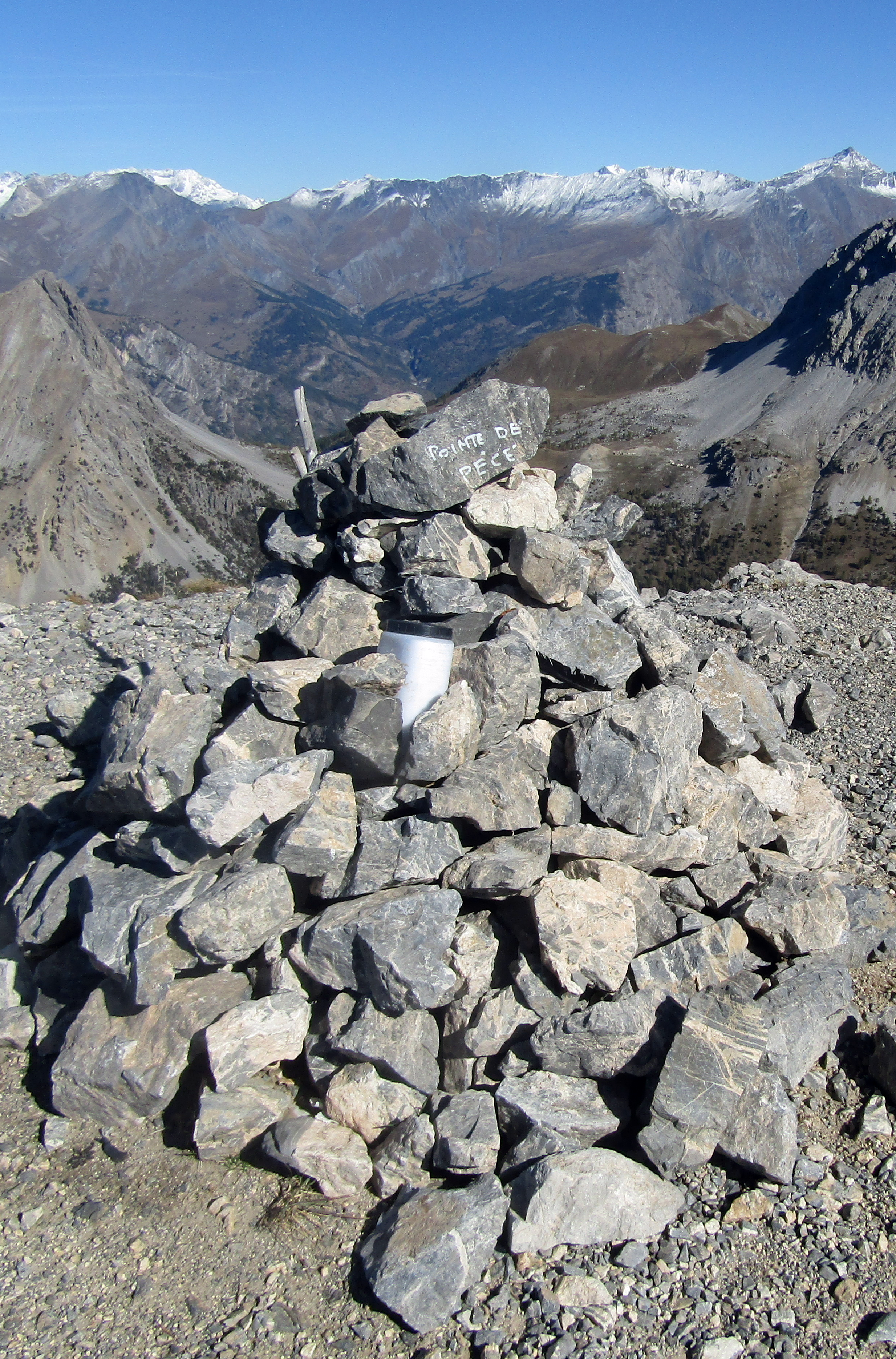 Pointe de Pécé - Massif des Cerces